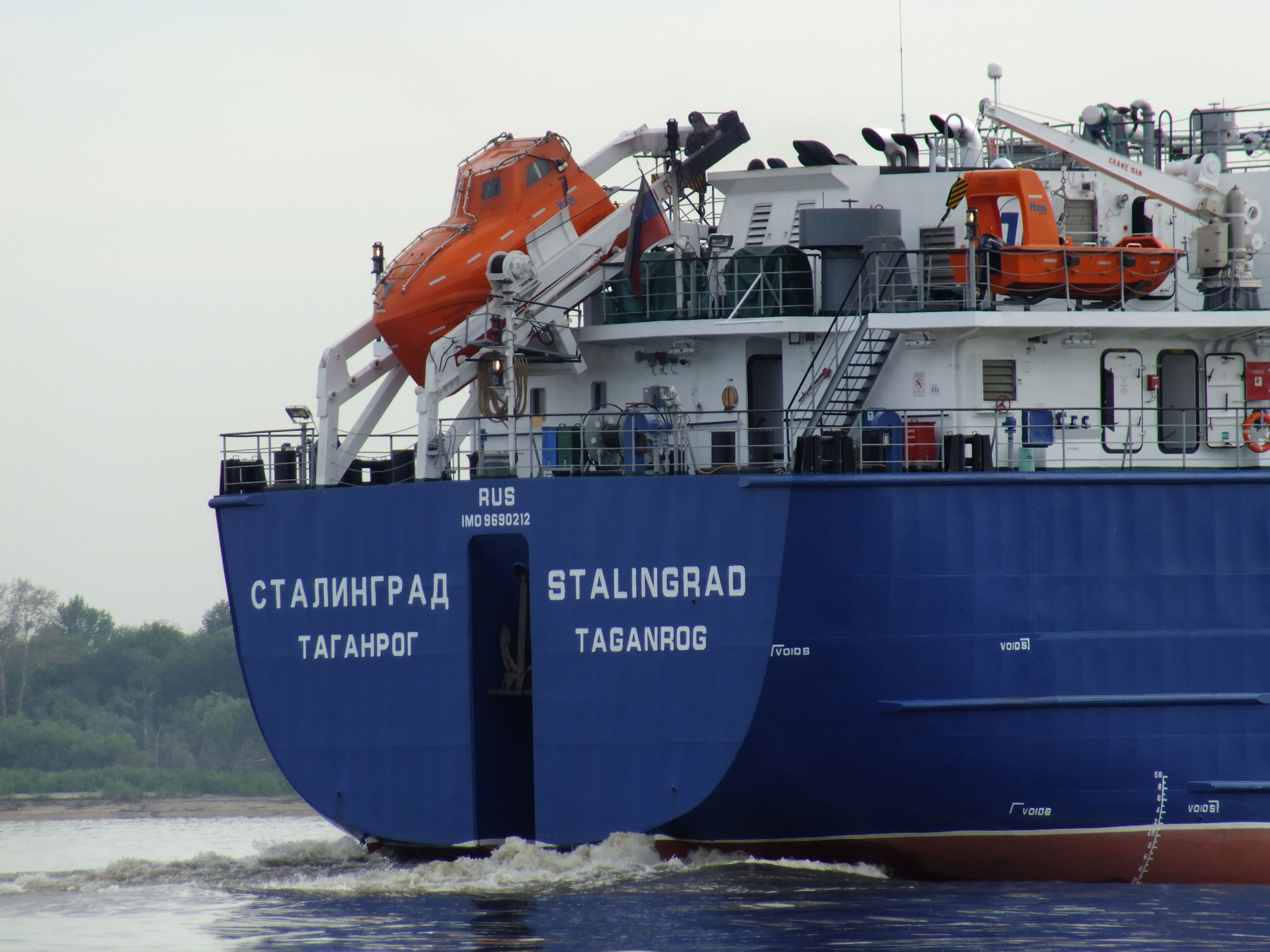 Танкер СТАЛИНГРАД на Амуре